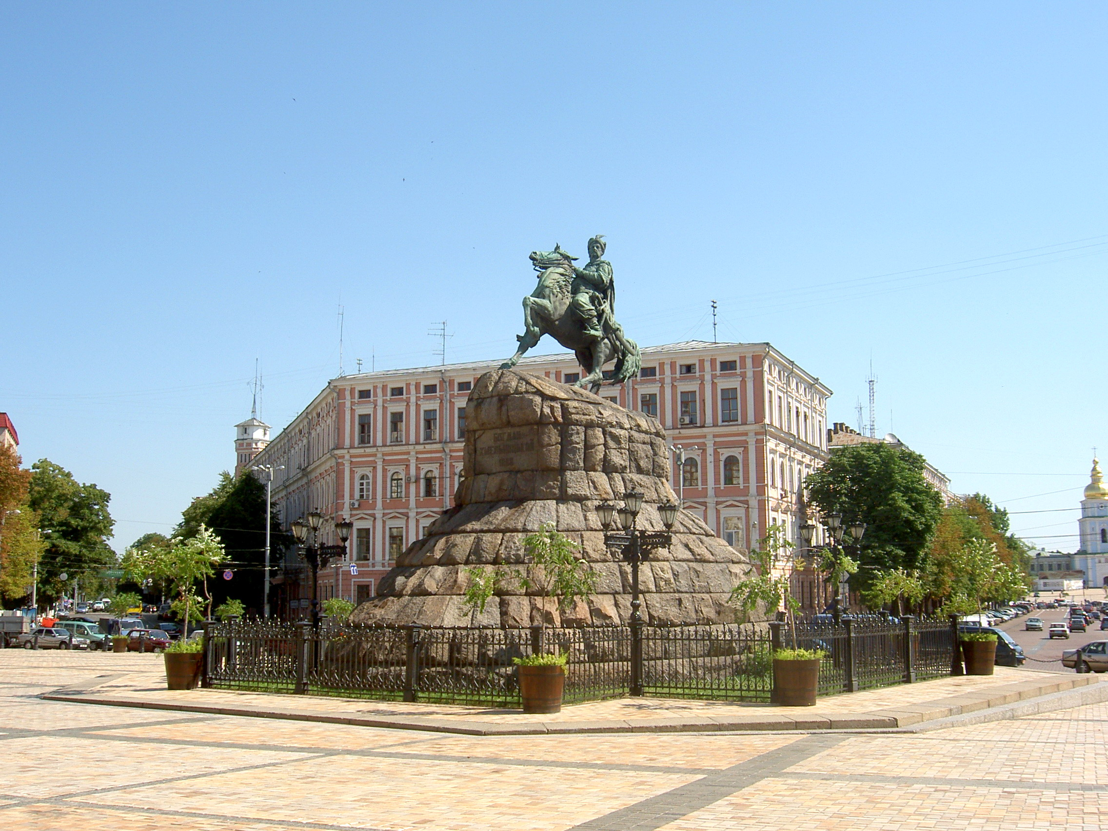 Socha Bohdana Chmelnického, Kyjev